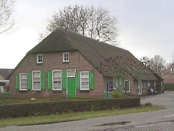 Boerderij in Rouveen, eigen foto